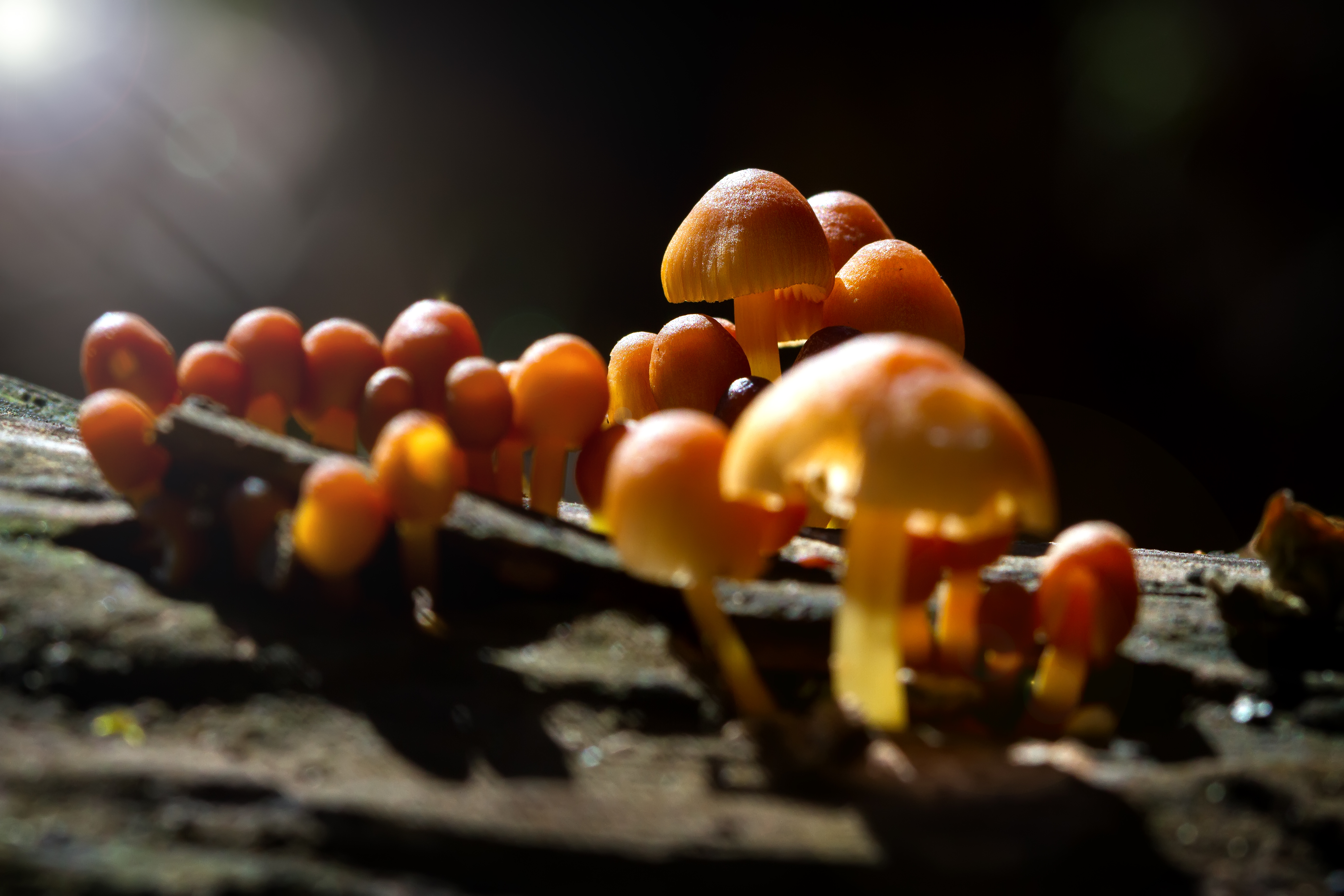 Μανιτάρια, στην περιοχή του Παρανεστίου, κοντά στον καταρράχτη της Αγίας Βαρβάρας. This is a photography of Natura 2000 protected area with ID GR1140003